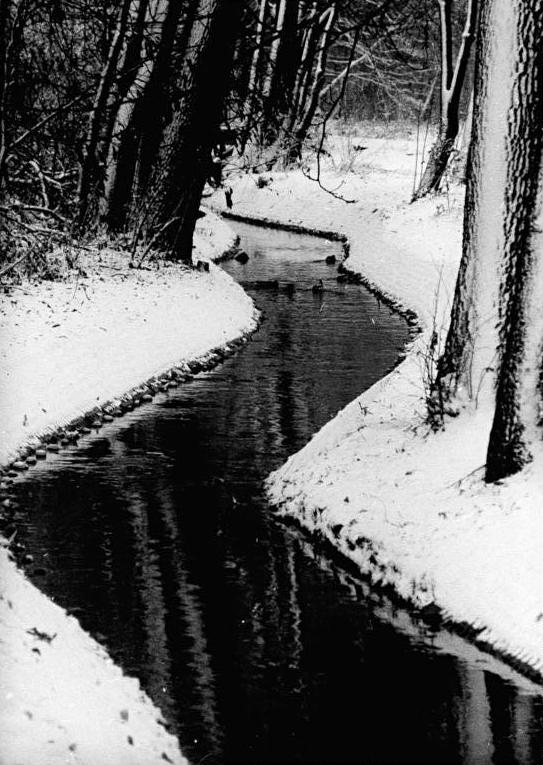 Berlin, Schlosspark, Panke, Wald, Winter ADN-ZB Altwein 25.1.84 Berlin: Warum in die Ferne schweifen? Wer dieses idyllische Flüßchen in verschneiter Landschaft näher kennenlernen möchte, braucht nur nach Buch zu fahren. Dort fließt die Panke durch den Schloßpark.